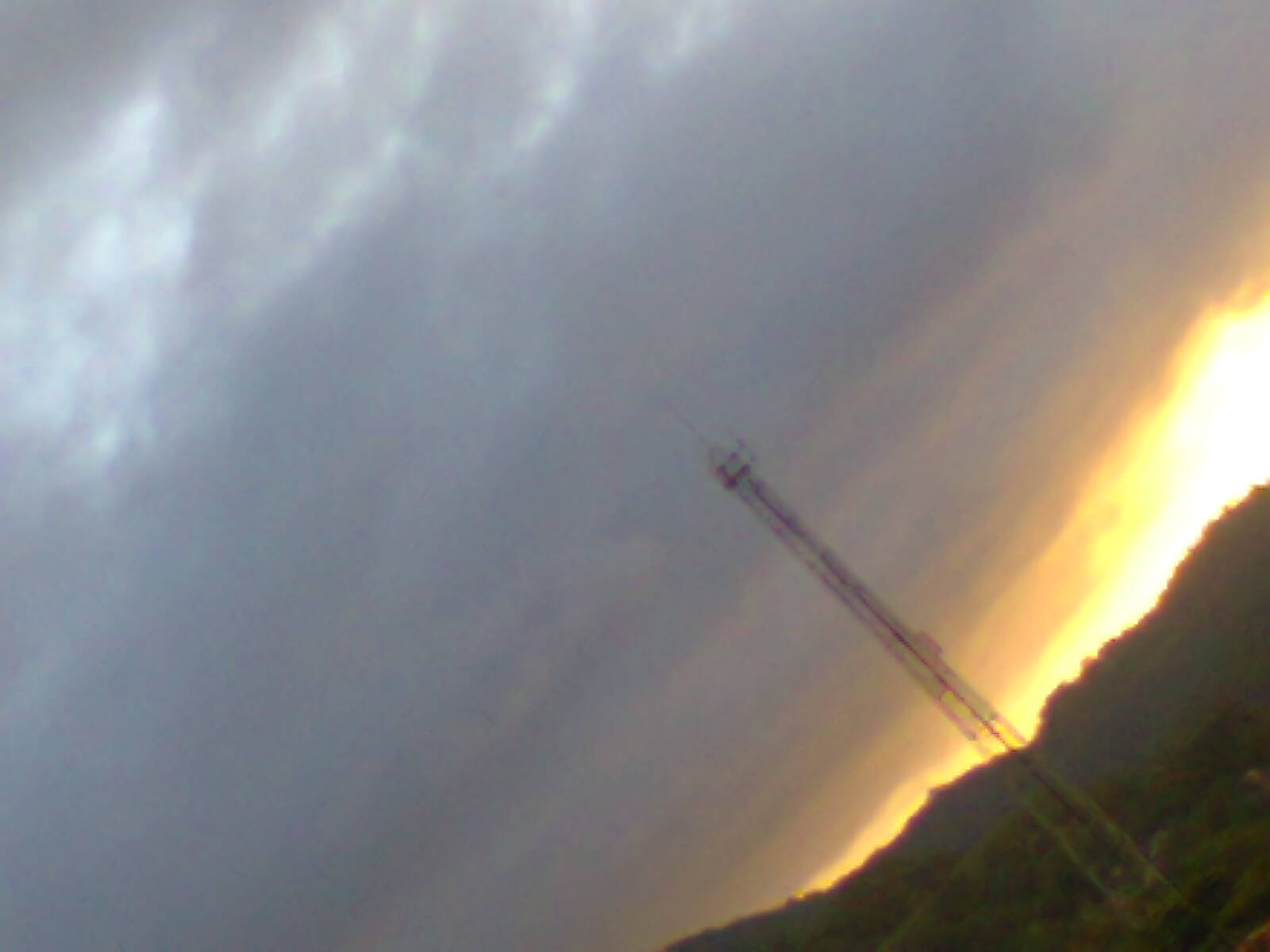 Atena da Claro